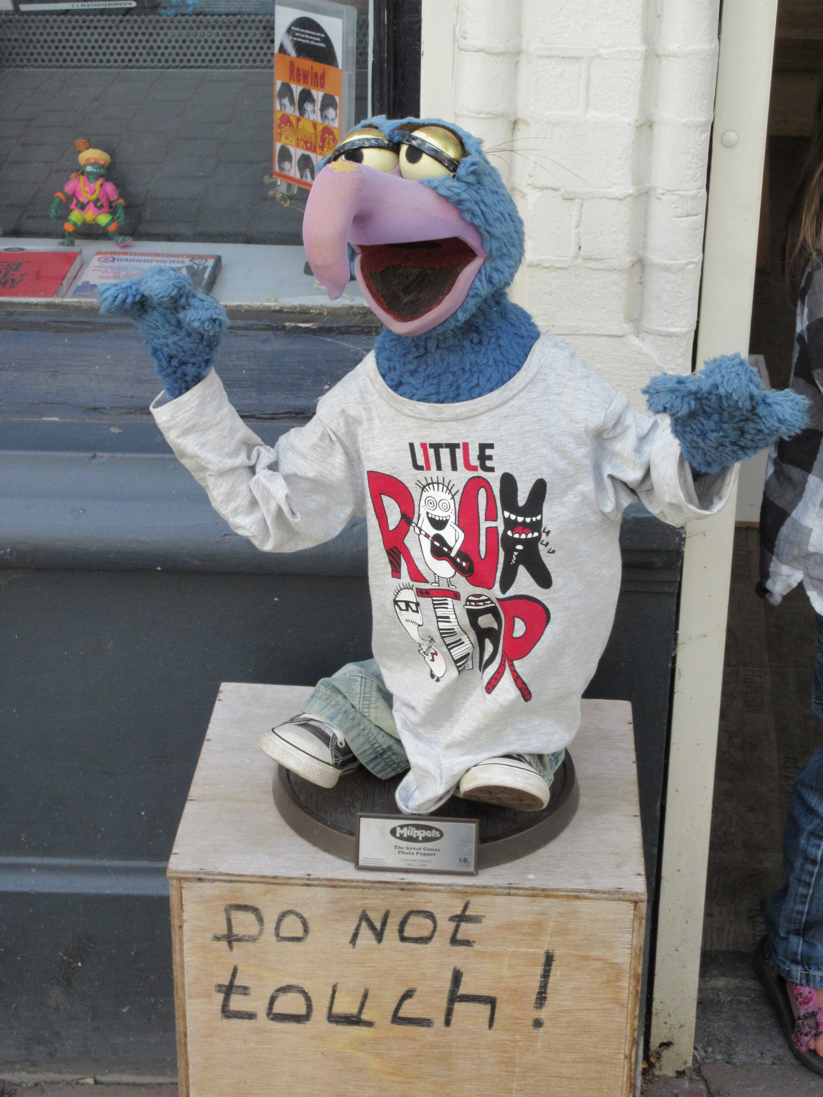 Nijmegen - Muppet v2